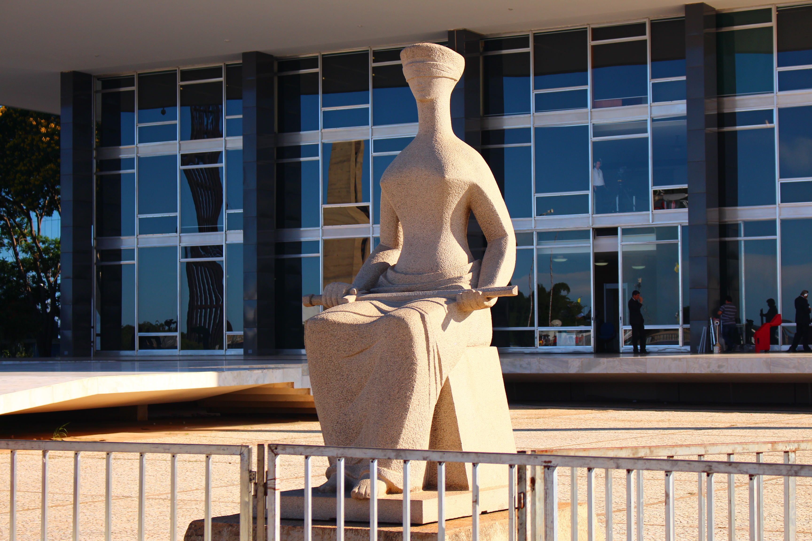 Conjunto urbanístico de Brasília construído em decorrência do Plano Piloto traçado para a cidade